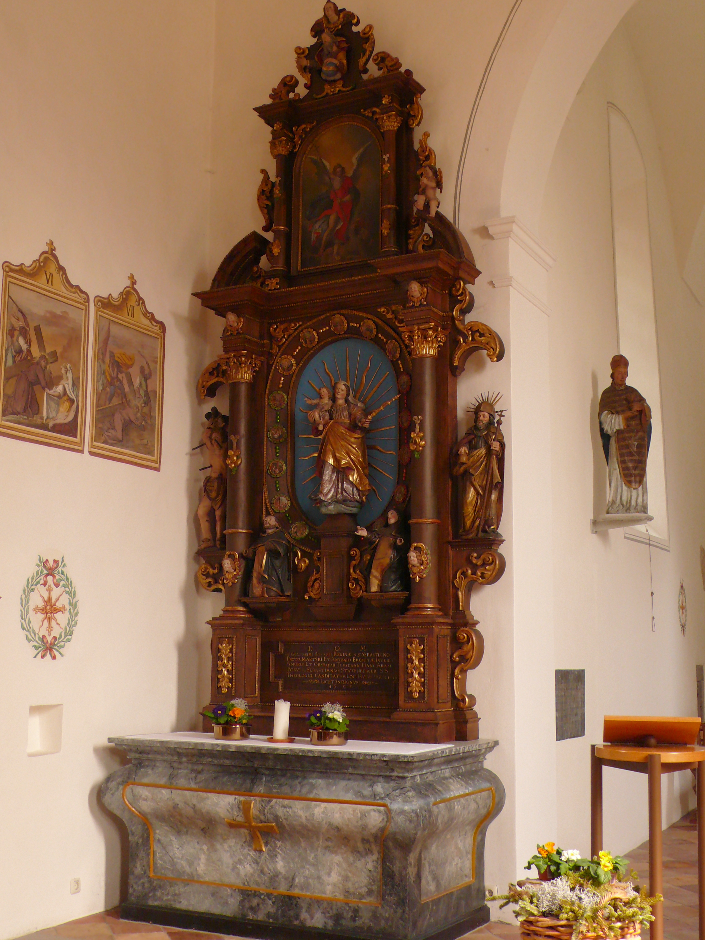 Pfarrkirche St. Corneli,Feldkirch-Tosters, Seitenaltar links